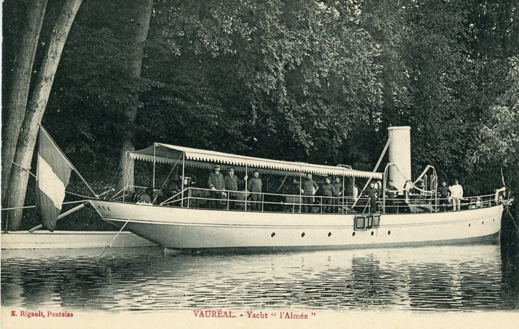 Le yacht de rivière "Almée", appartenant à Henri Menier, amarré à Vauréal